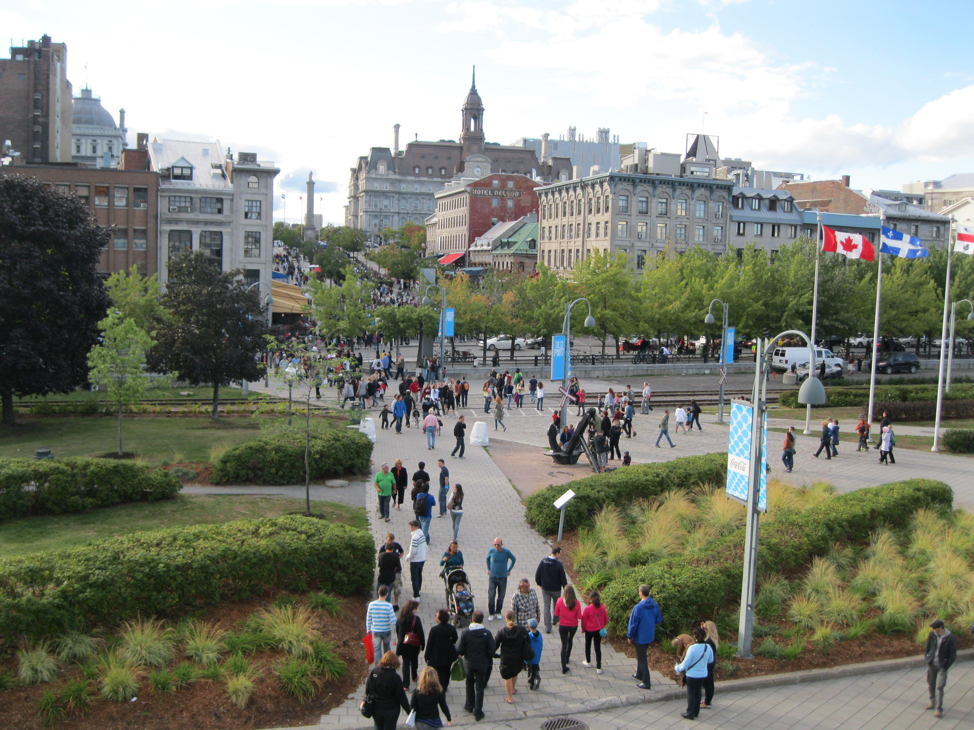 Vieux-Port de Montréal